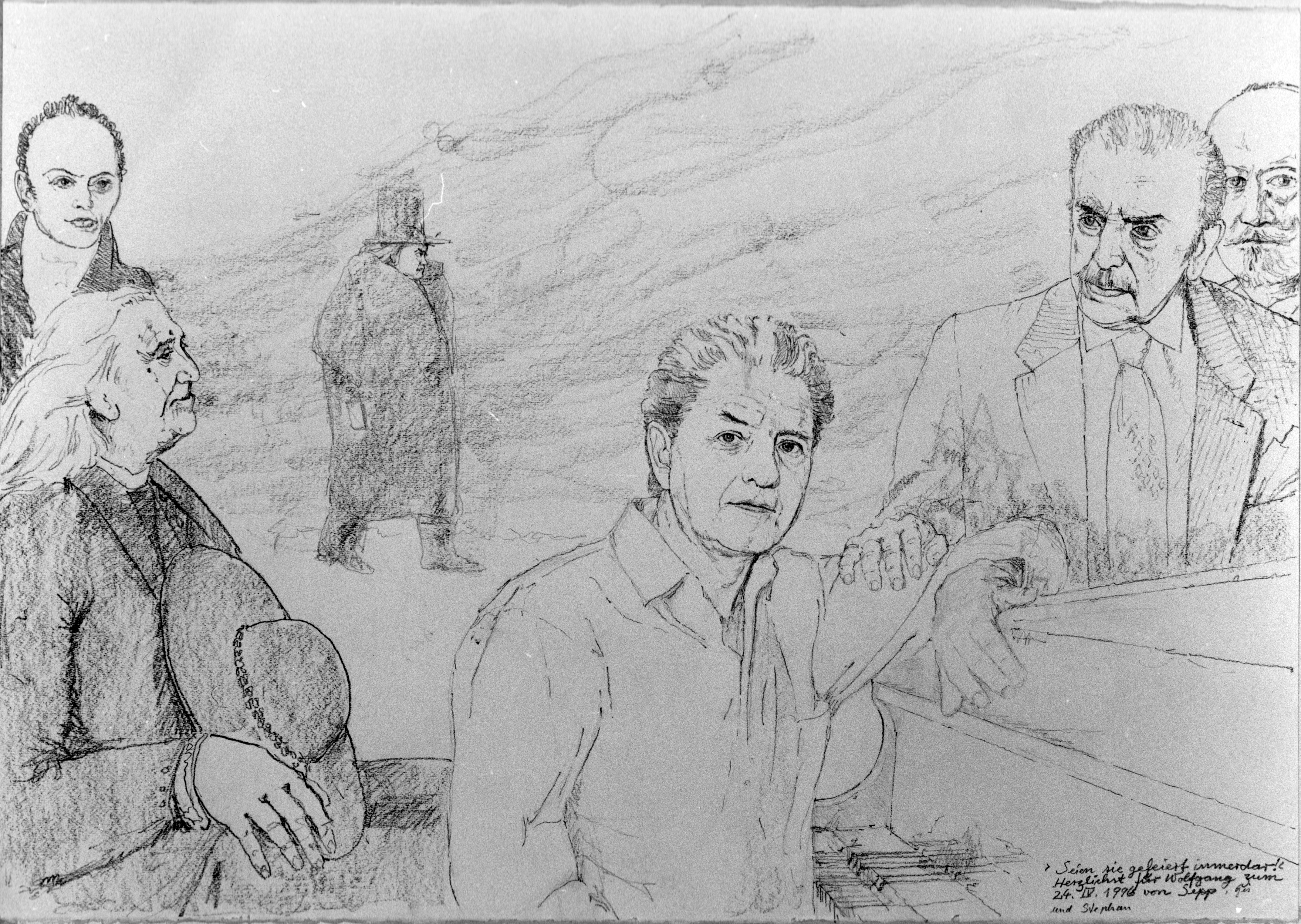 "Seien Sie gefeiert immer da" von Joseph Harnest, Bleistiftzeichnung zu Wolfgang Leibnitz, 1996